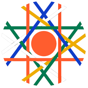 สัญลักษณ์การแข่งขันกีฬามหาวิทยาลัยแห่งประเทศไทย ครั้งที่ 46